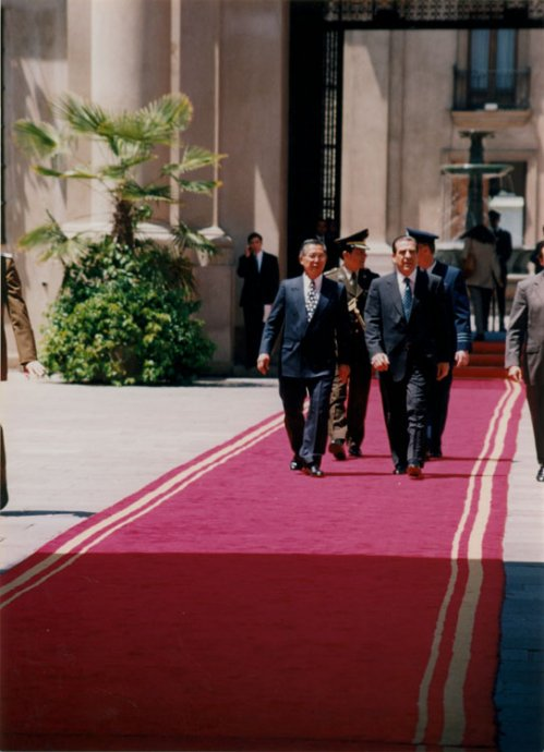 Visita del Presidente de Perú Alberto Fujimori a Chile. (30-11-1999)